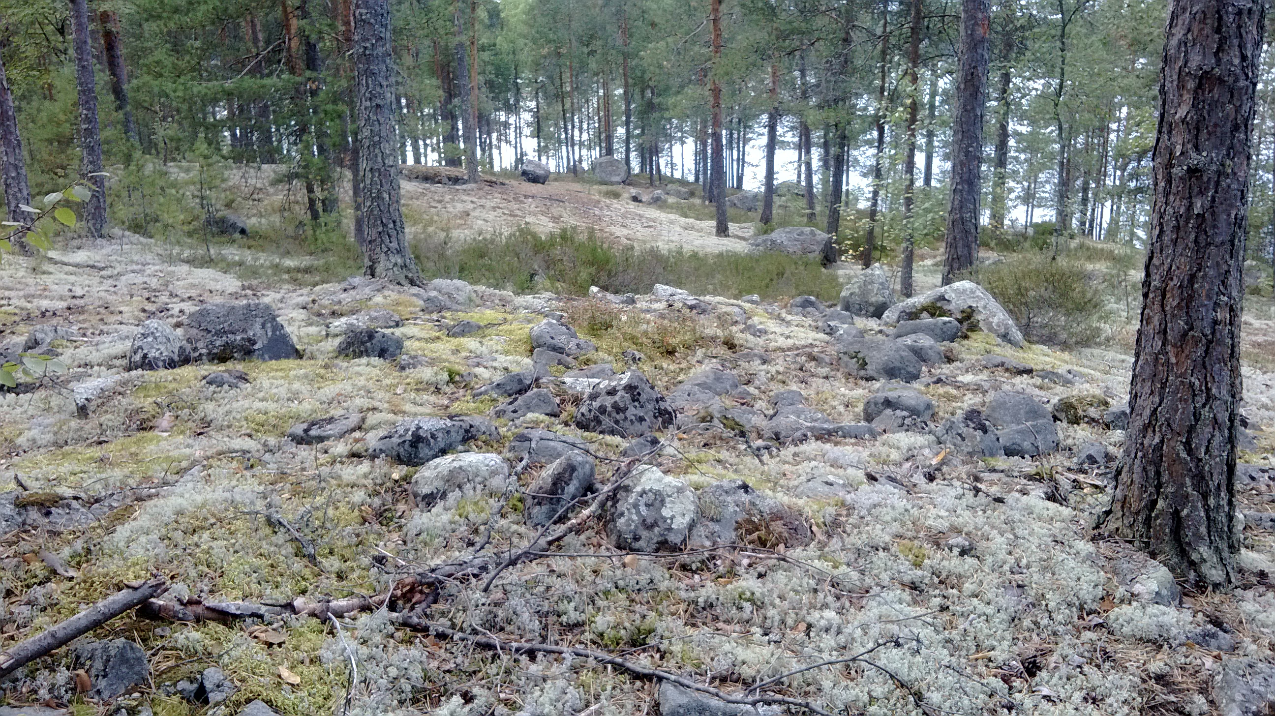 Jyväskylän Vaajakoskella oleva lapinraunio, Leppävesi-järven Pyhäsaari